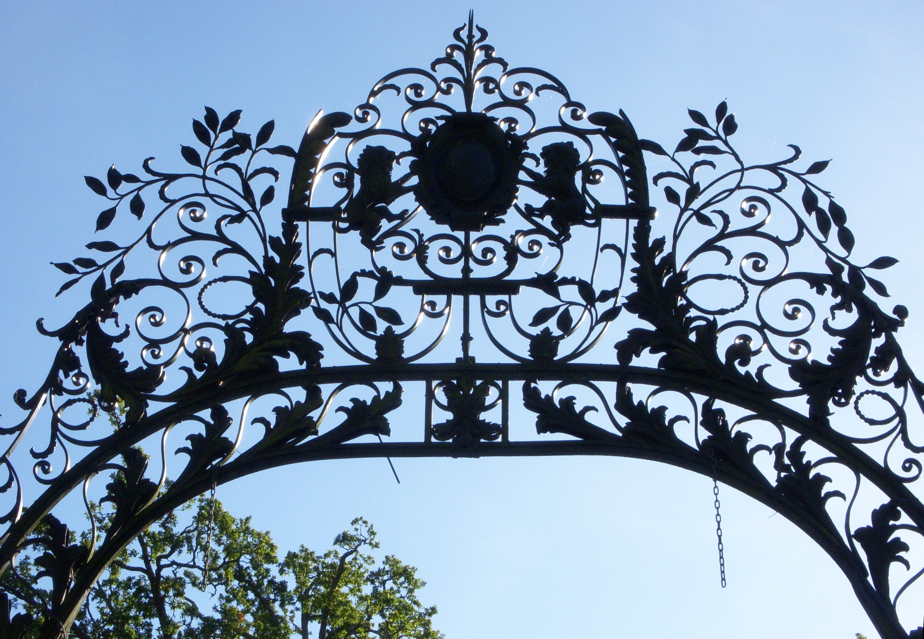 Häringe slott, entréportal